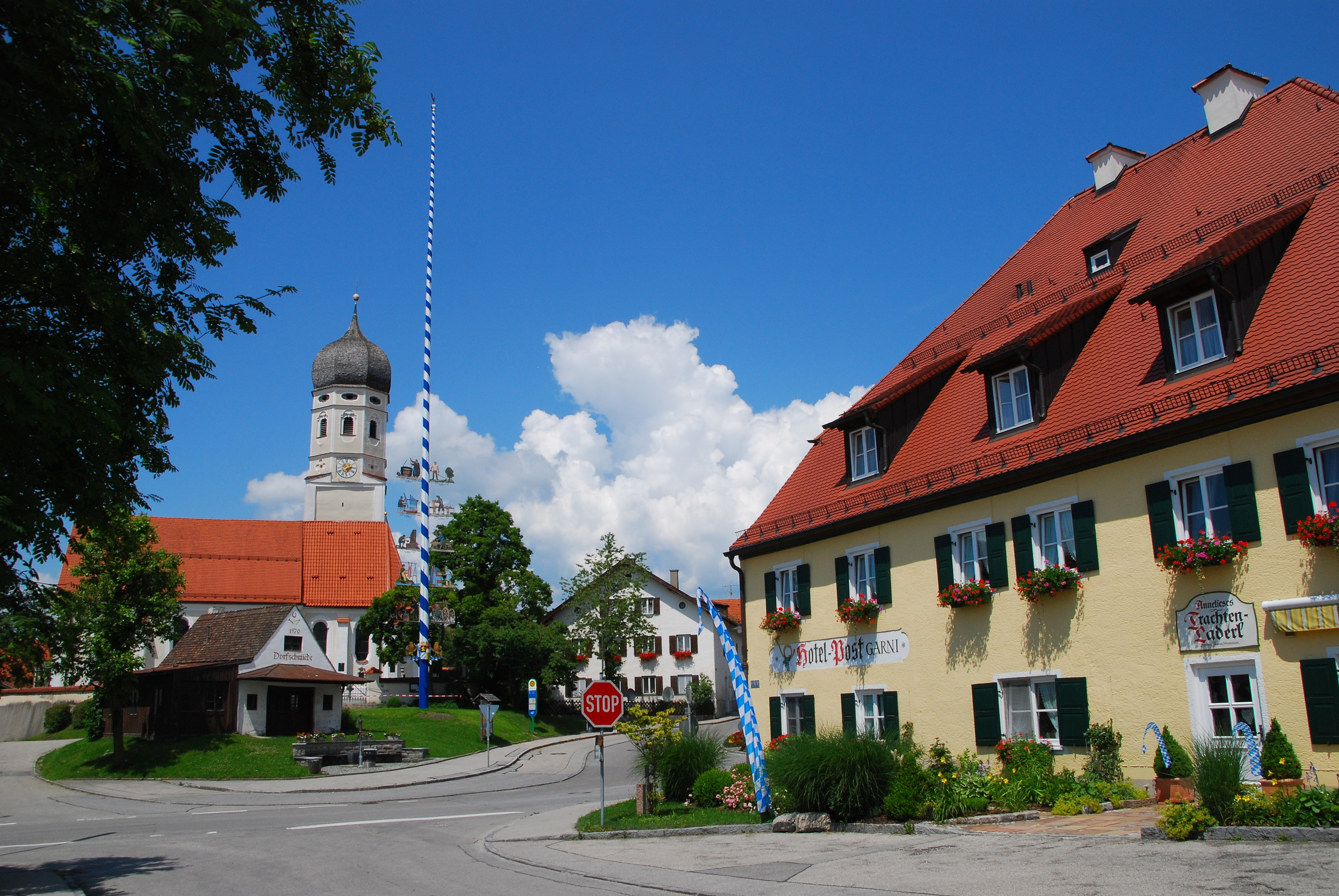 Andechs, OT Erling, Kerschlacher Weg 1. Der Gasthof zur Post (heute Hotel Post), ein breit gelagerter, zweigeschossiger Halbwalmdachbau aus dem 18. Jahrhundert, bildet zusammen mit der Kirche St. Vitus, der kleinen ehemaligen Dorfschmiede und dem Maibaum eines der schönsten Dorfzentren des Landkreises Starnberg.